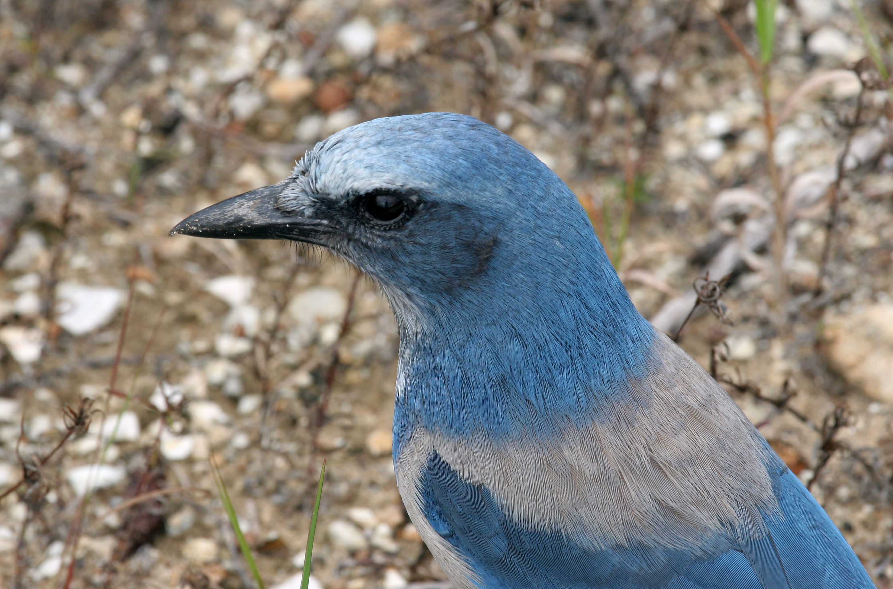 Florida scrub jay